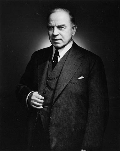 Rt. Hon. W.L. Mackenzie King, Prime Minister of Canada